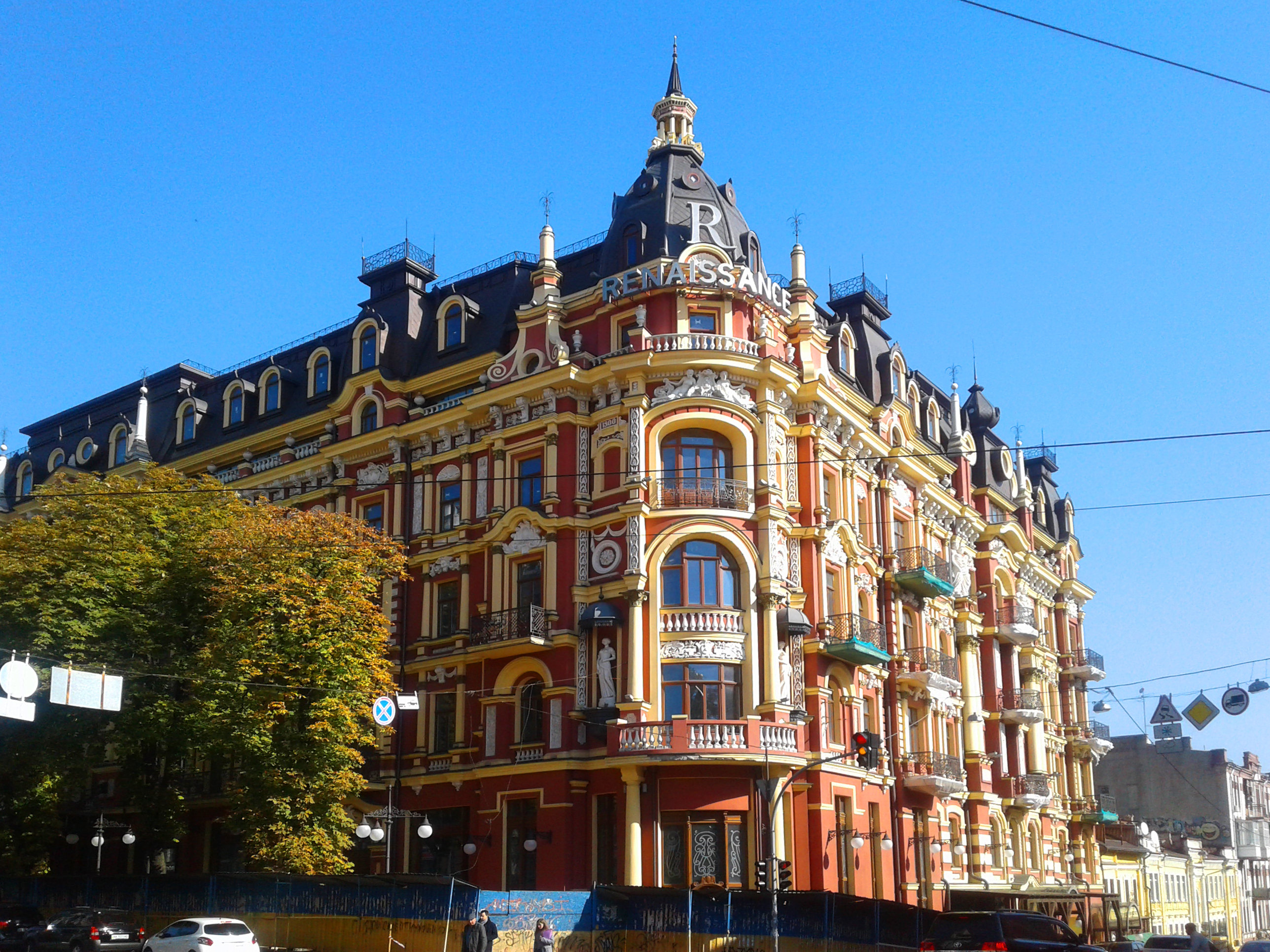 Будинок прибутковий, Київ, Володимирська вул., 39/24